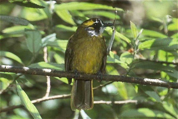 Pycnonotus penicillatus ; bulbul oreillard